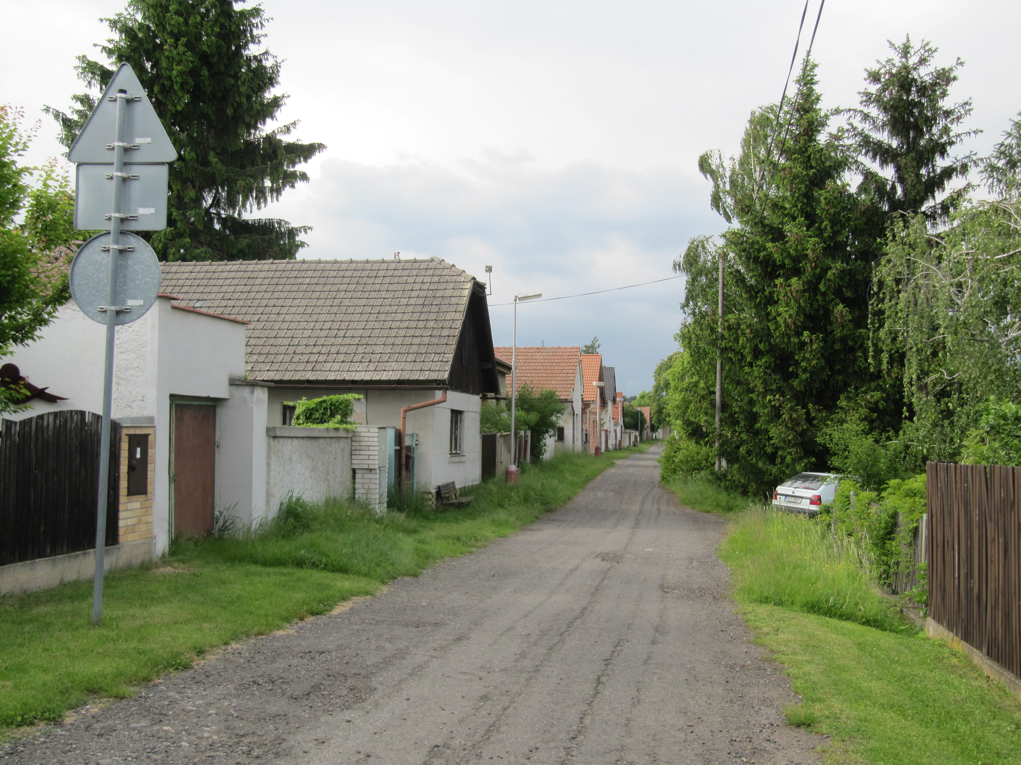 Ostrá, okres Nymburk, Česká republika, část Šnepov.